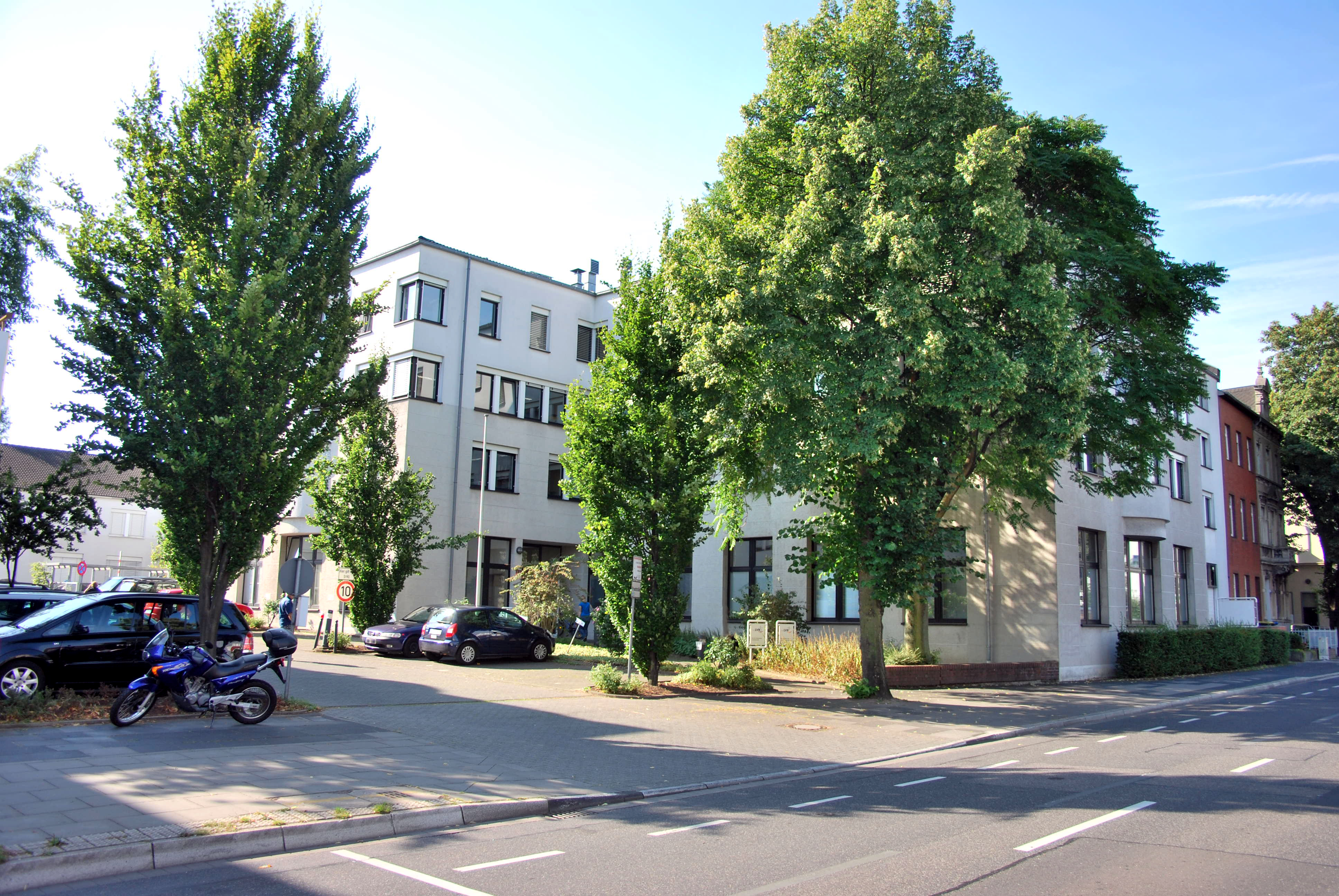 LVR-Amt für Bodendenkmalpflege im Rheinland, Endenicher Straße 133, Bonn-Weststadt